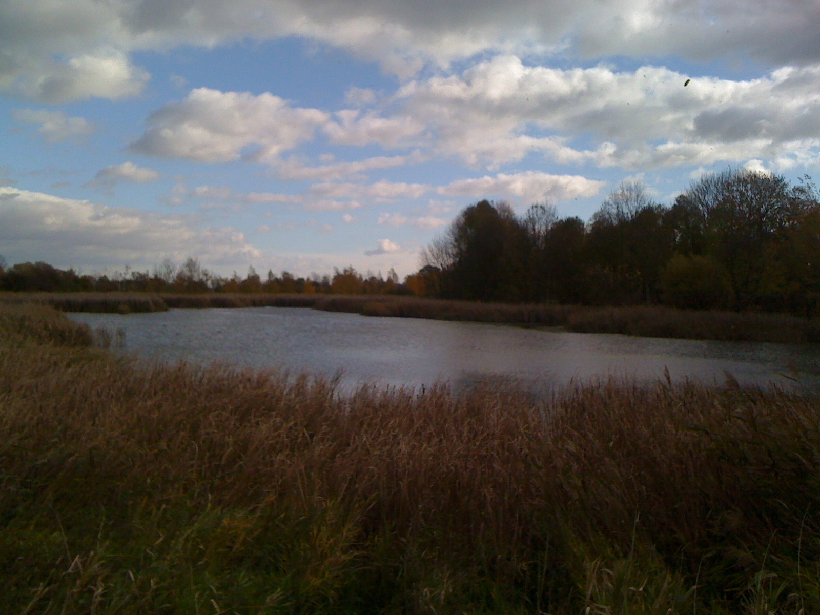 Kleiner Posthornteich in Halle (Saale) von Westen, Stadtteil Mötzlich